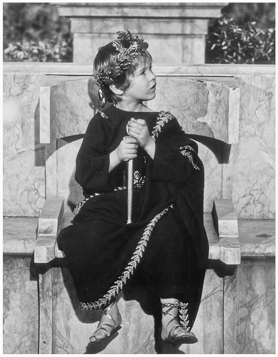 Loris Loddi unico interprete nel montaggio finale del film di Cesarione, nel kolossal Cleopatra